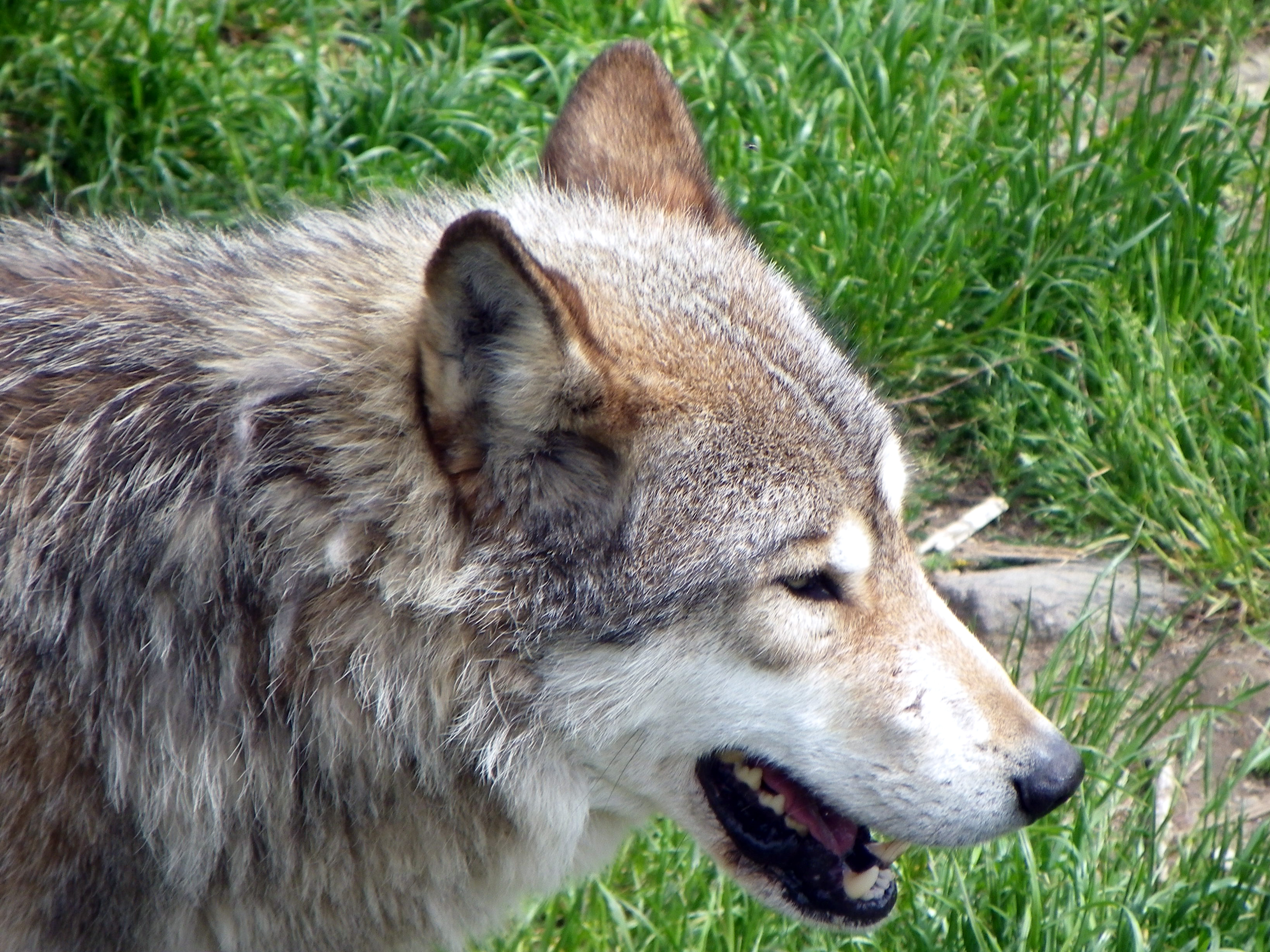 Loup de Pologne au Parc à loups du gévaudan